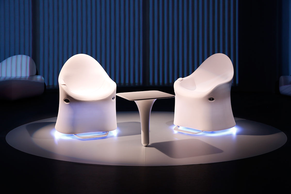 インタラクティブチェアー